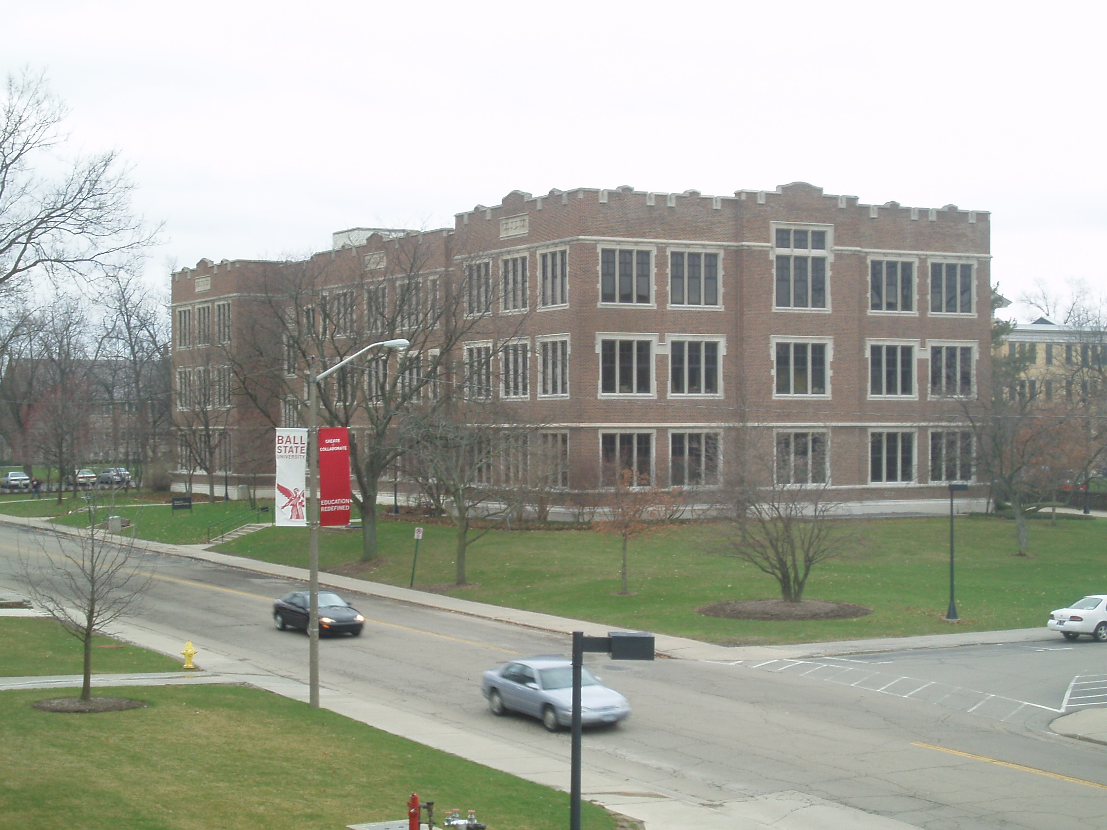 Burkhardt Building at BSU